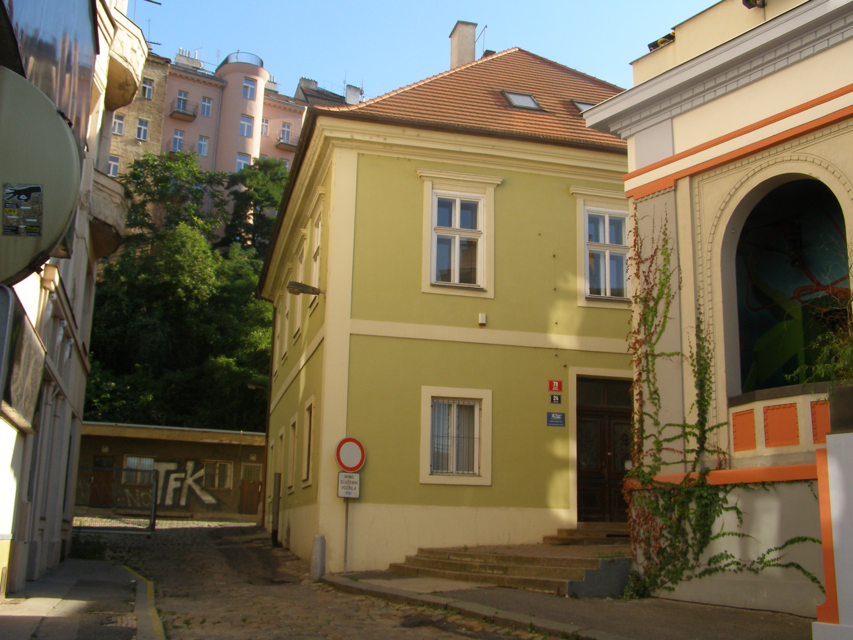 Venkovská usedlost Miranka, Praha 3-Žižkov, Husitská 70/24 a 899/24a.